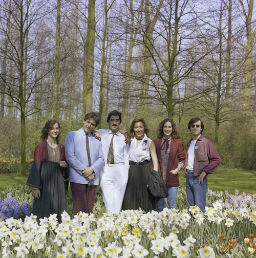 De Spaanse groep Trigo Limpio tijdens een fotosessie voor het Eurovisie Songfestival 1980